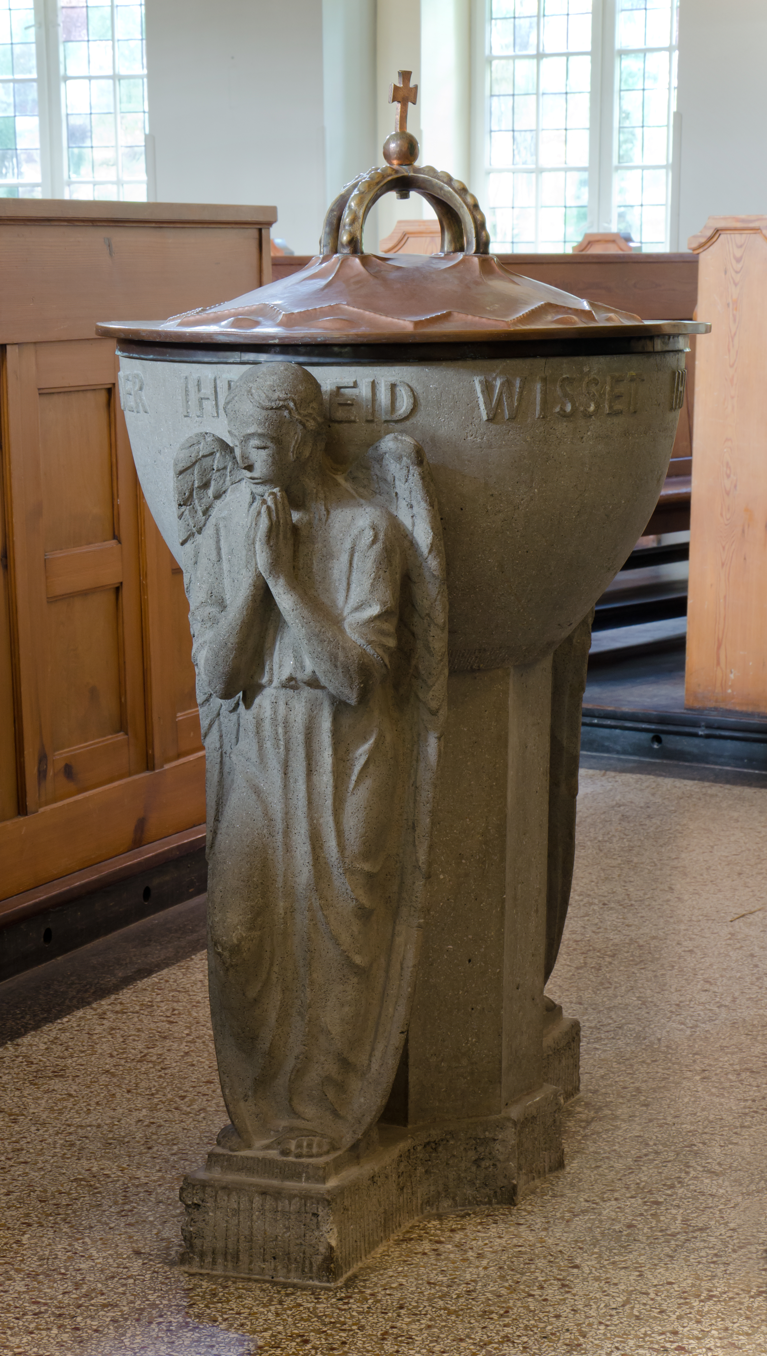 Hamburg Auferstehungskirche Barmbek, Tauffünte